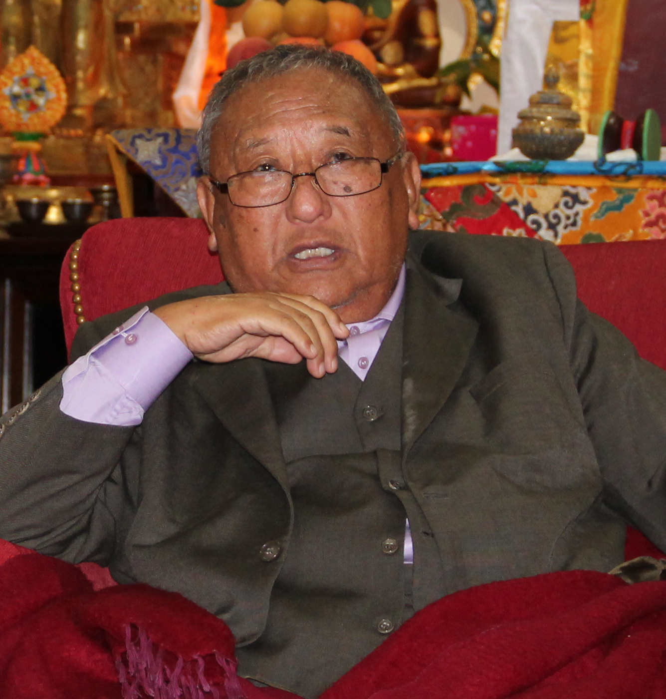 Thupten Donyo & Gelek Rinpoche @ Gyuto